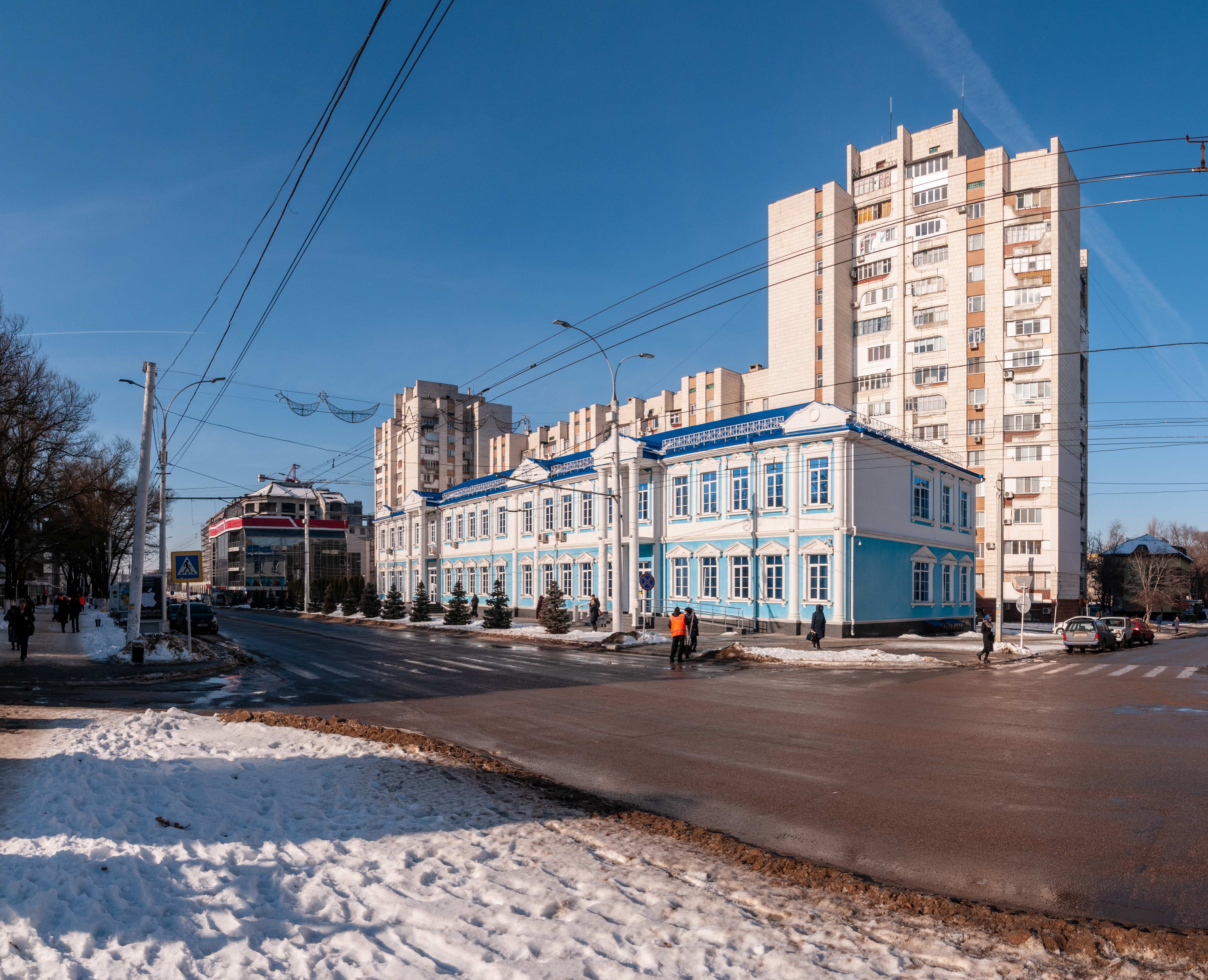 Tiraspol, Pridnestrowien, Poliklinik